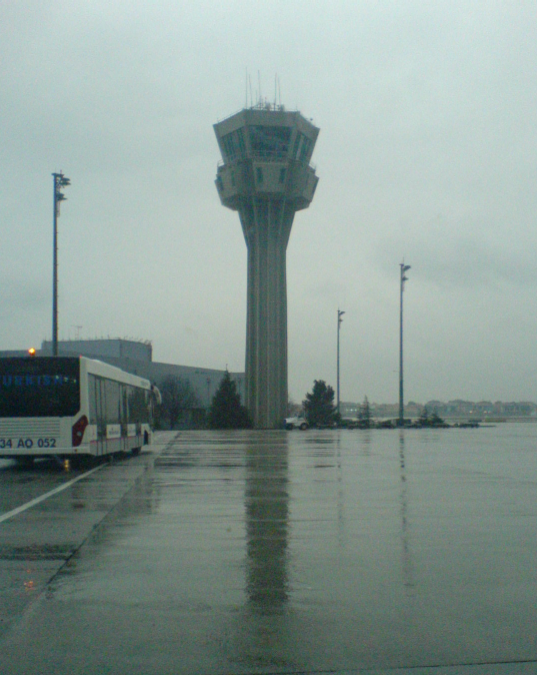 İstanbul Atatürk Hava Limanı Hava Trafik Kontrol (ATC) Kulesi. Plenumchamber tarafından 14/03/2007'de çekilmiştir.